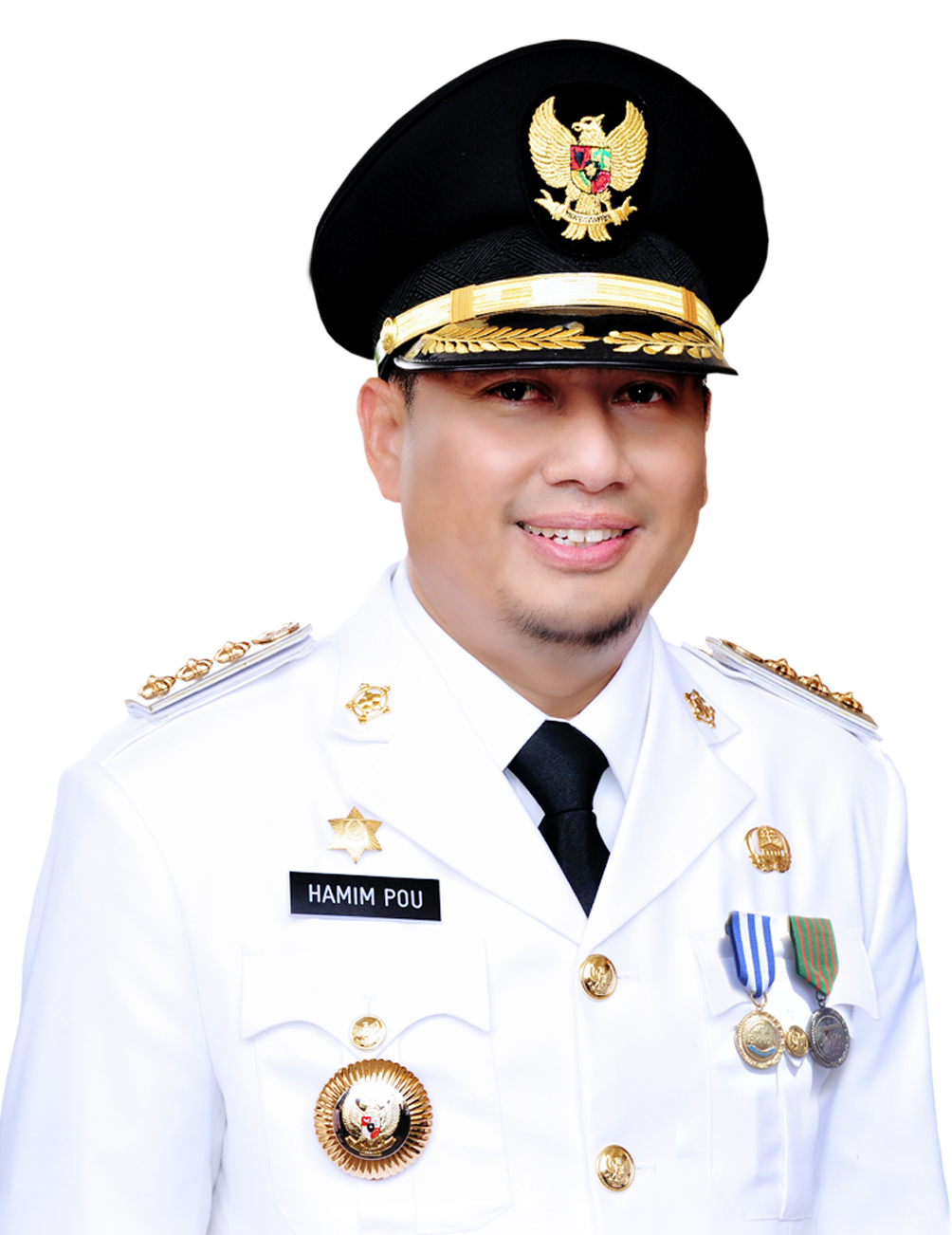 Bupati Bonbol Hanim Pou Periode ke-2